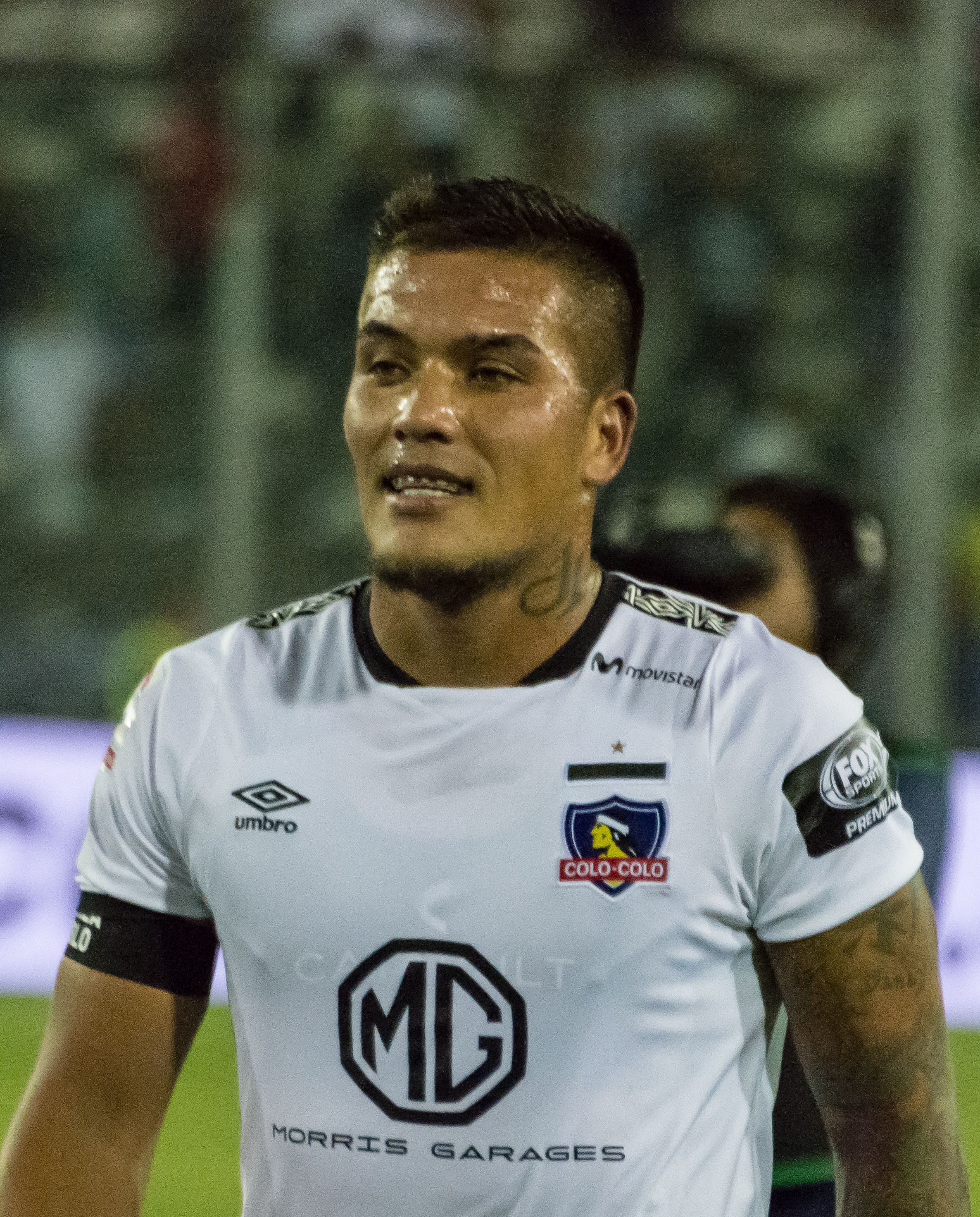 Colo-Colo v Palestino, Estadio Monumental, Macul, Santiago, Región Metropolitana, Chile